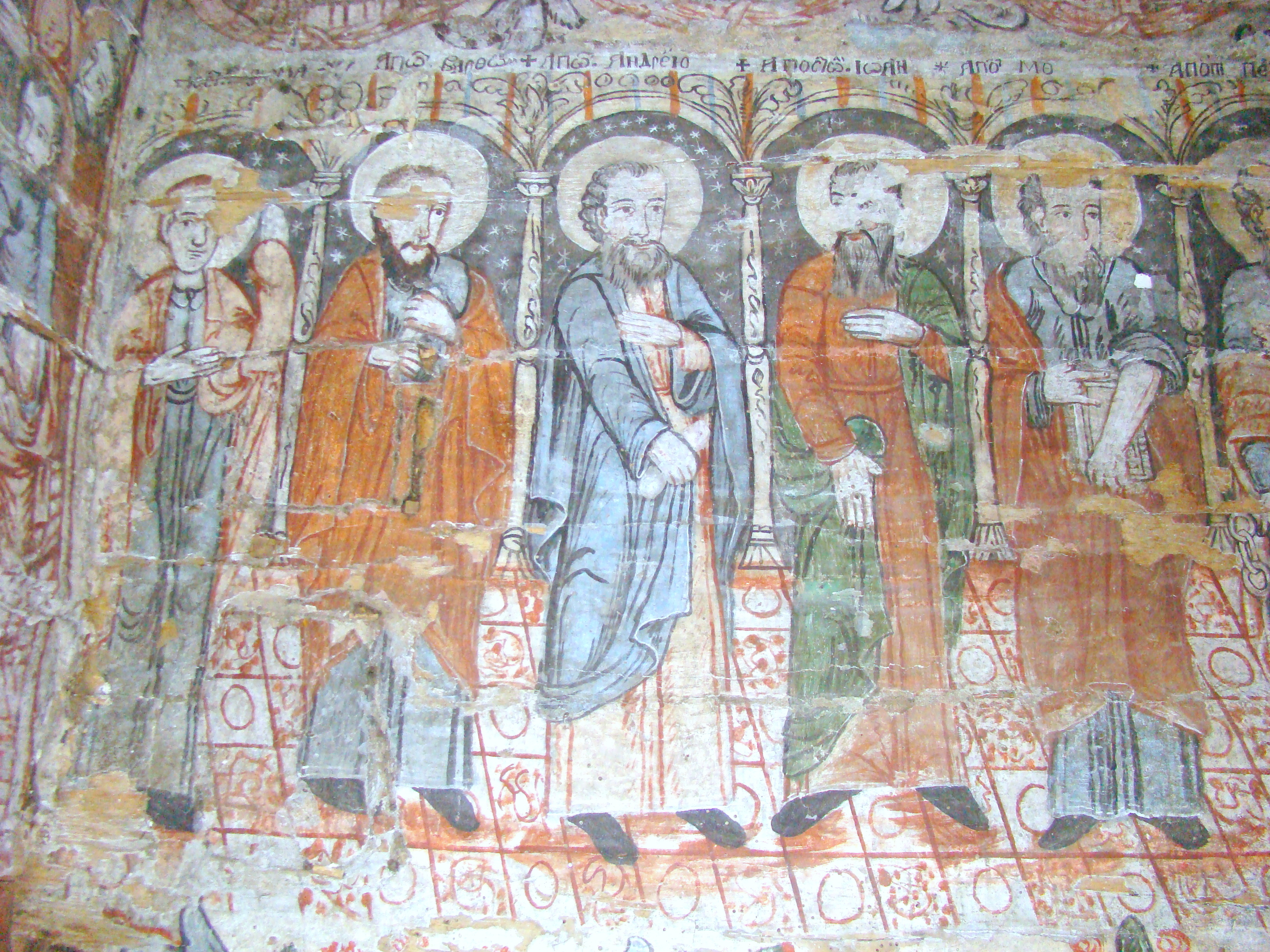 Biserica de lemn din Racâș, județul Sălaj